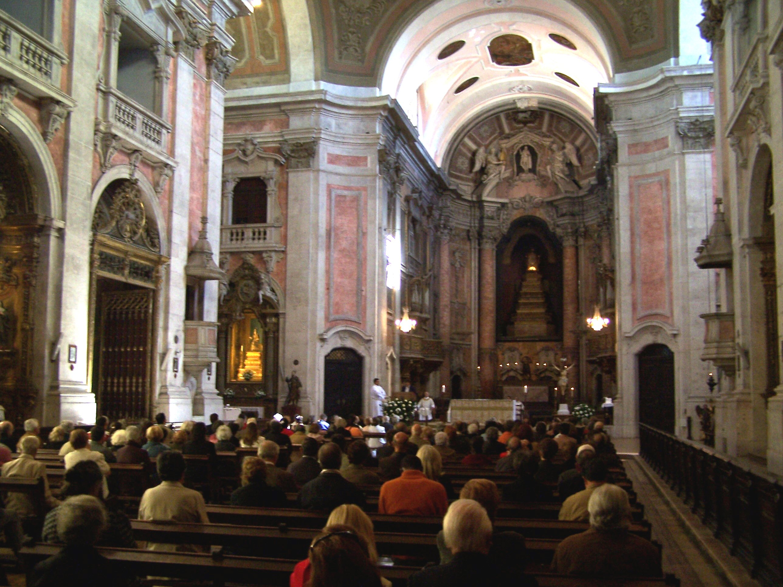 Lisboa - Igreja e Convento da Graça / vista Rococo interior.